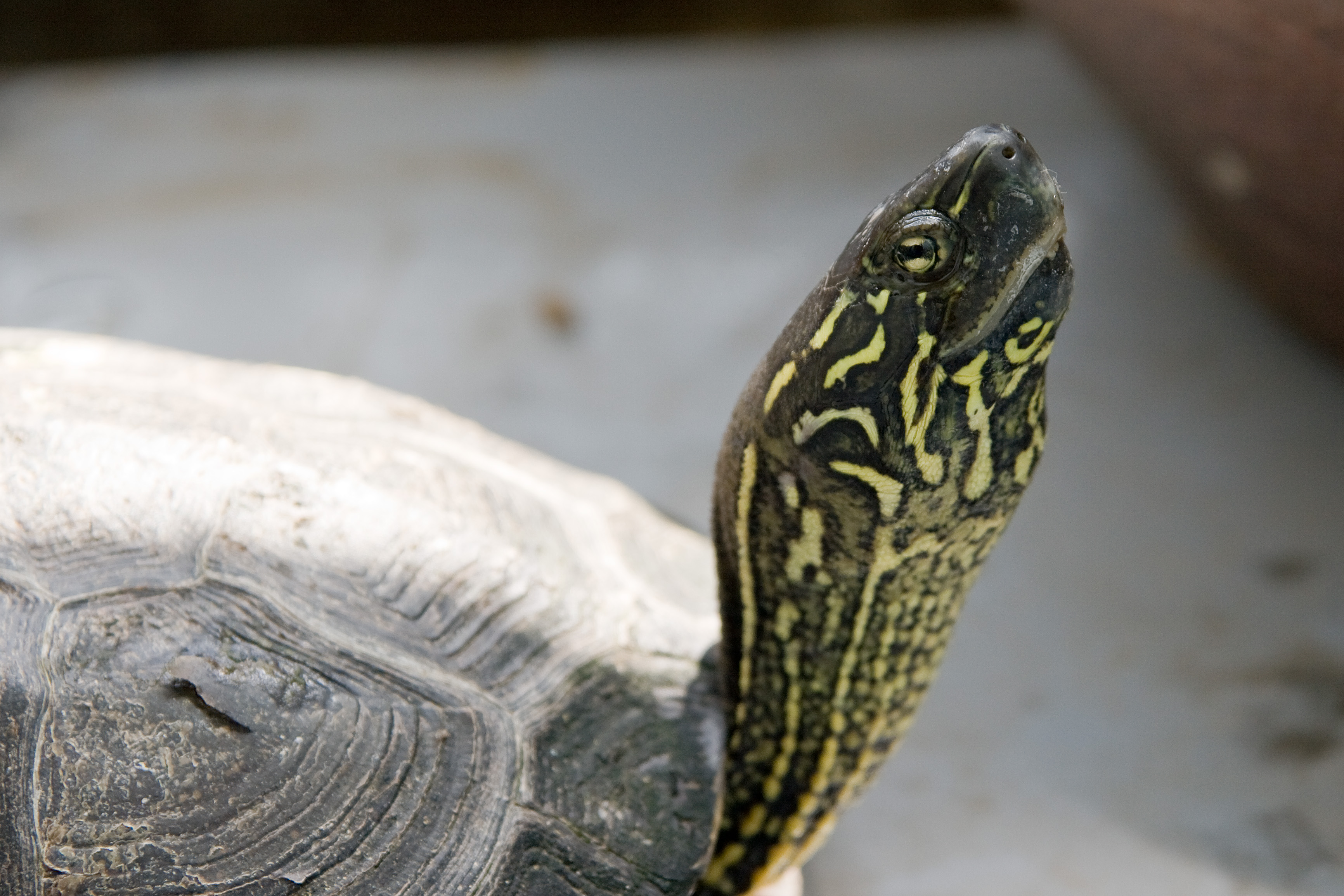 クサガメ (学名:Chinemys reevesii)